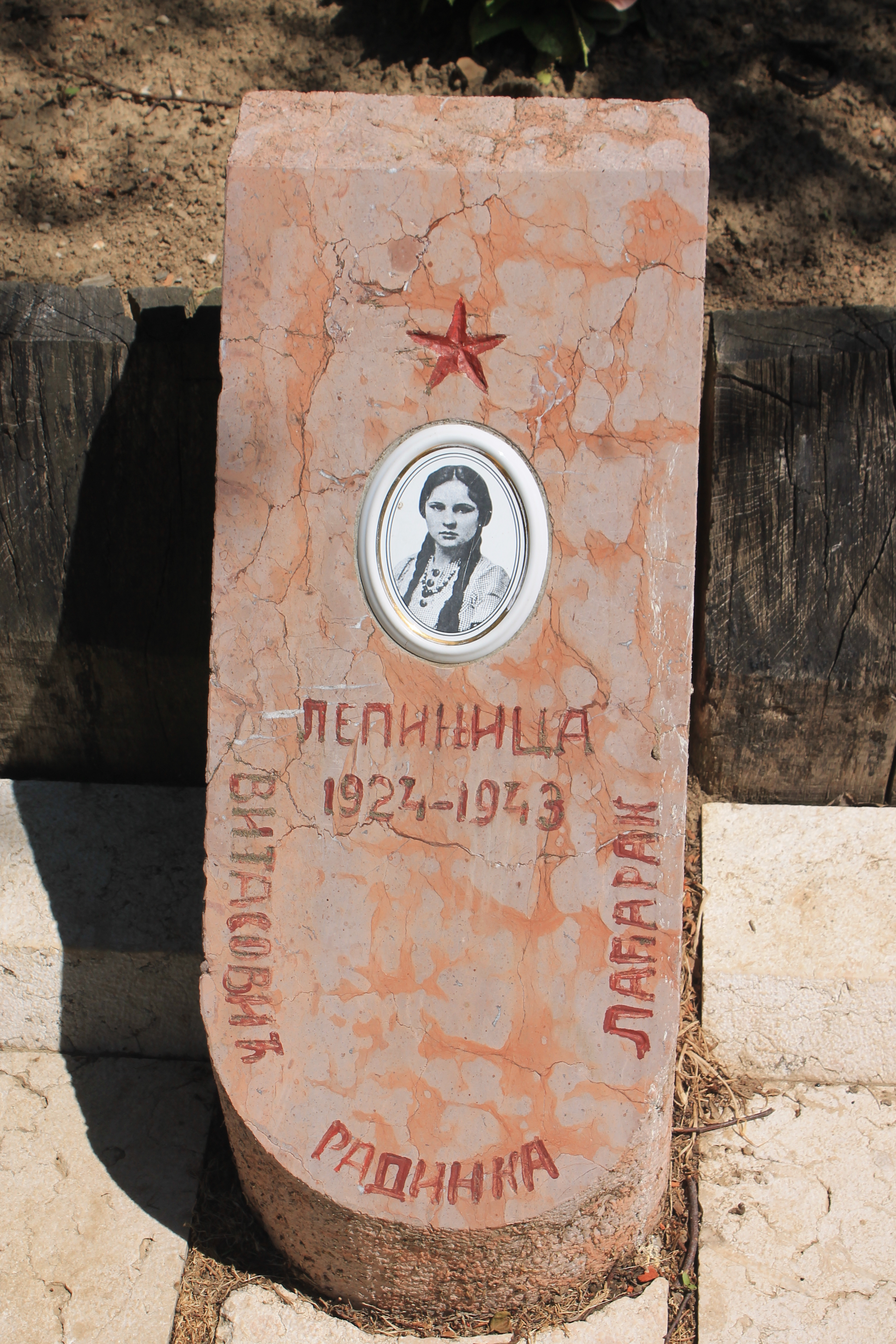 Spomen-obeležje Lepinjica